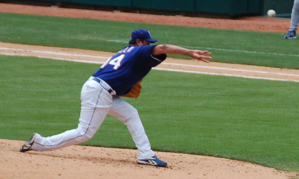 Vicente Padilla